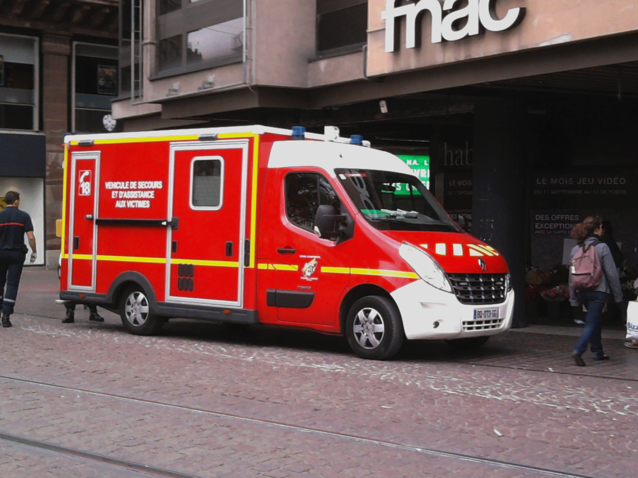 VSAV en intervention en centre-ville à Strasbourg, devant la FNAC